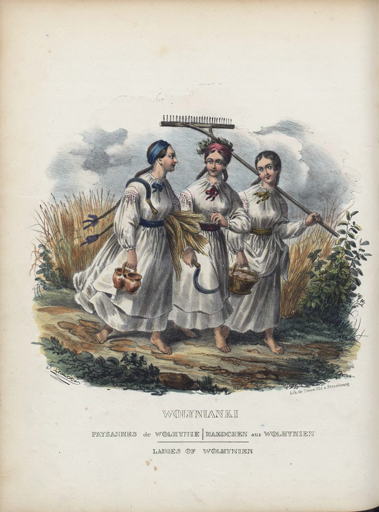 Волинянки